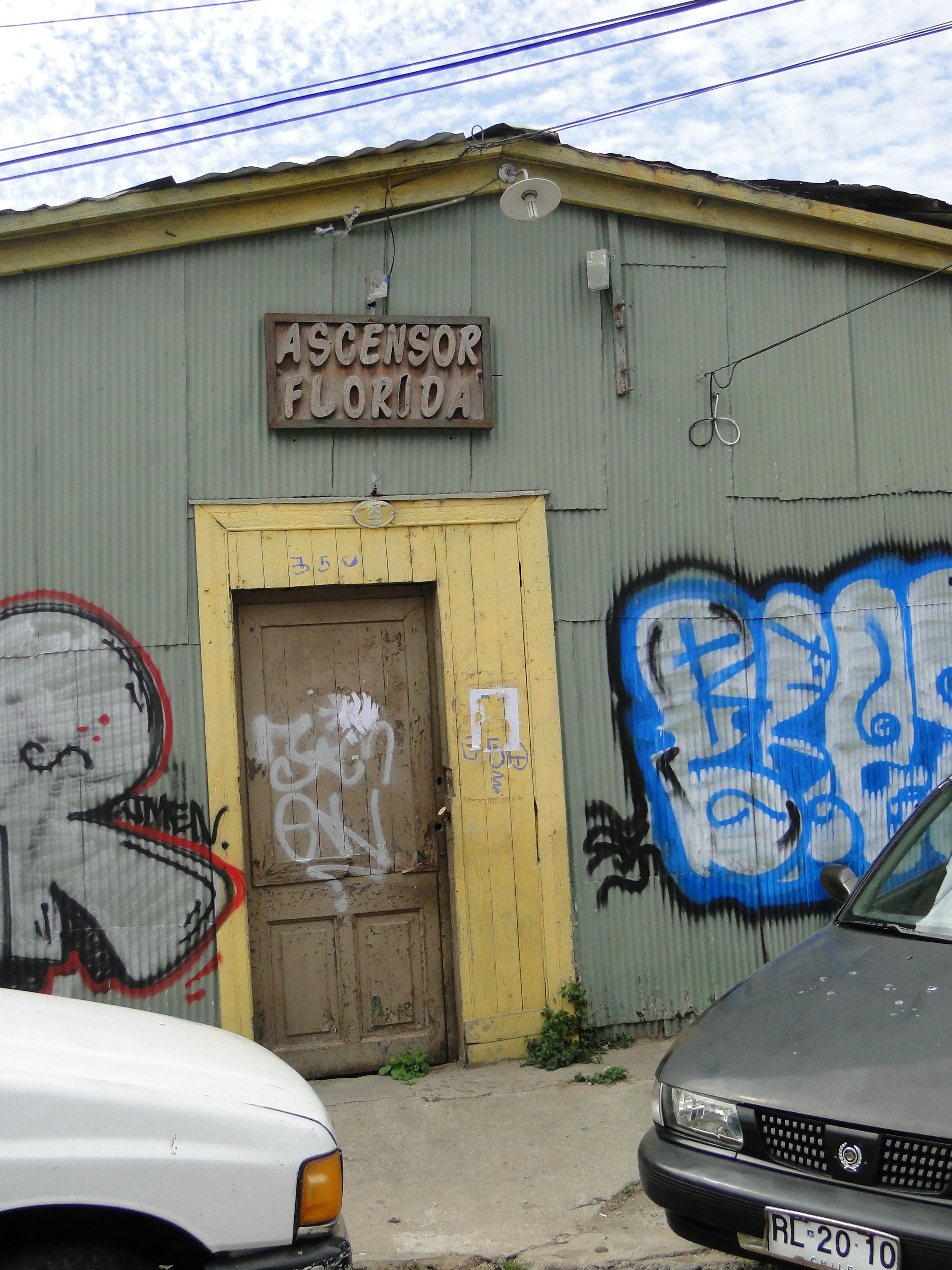 Ascensor Florida This is a photo of a national monument in Chile: 770